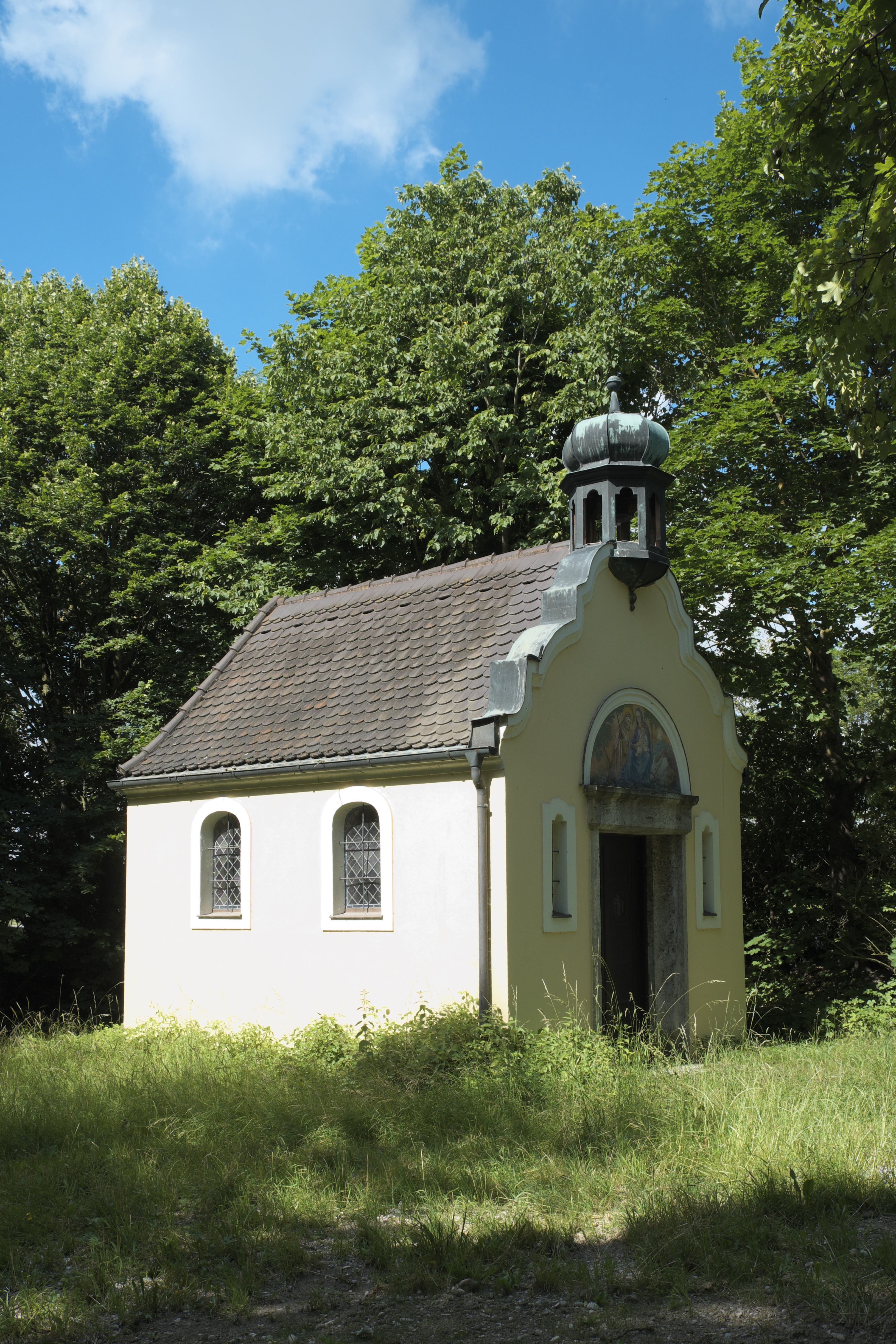 Hofkapelle des Guts Marienhof in Dietersheim (Eching) im Landkreis Freising (Bayern, Deutschland)